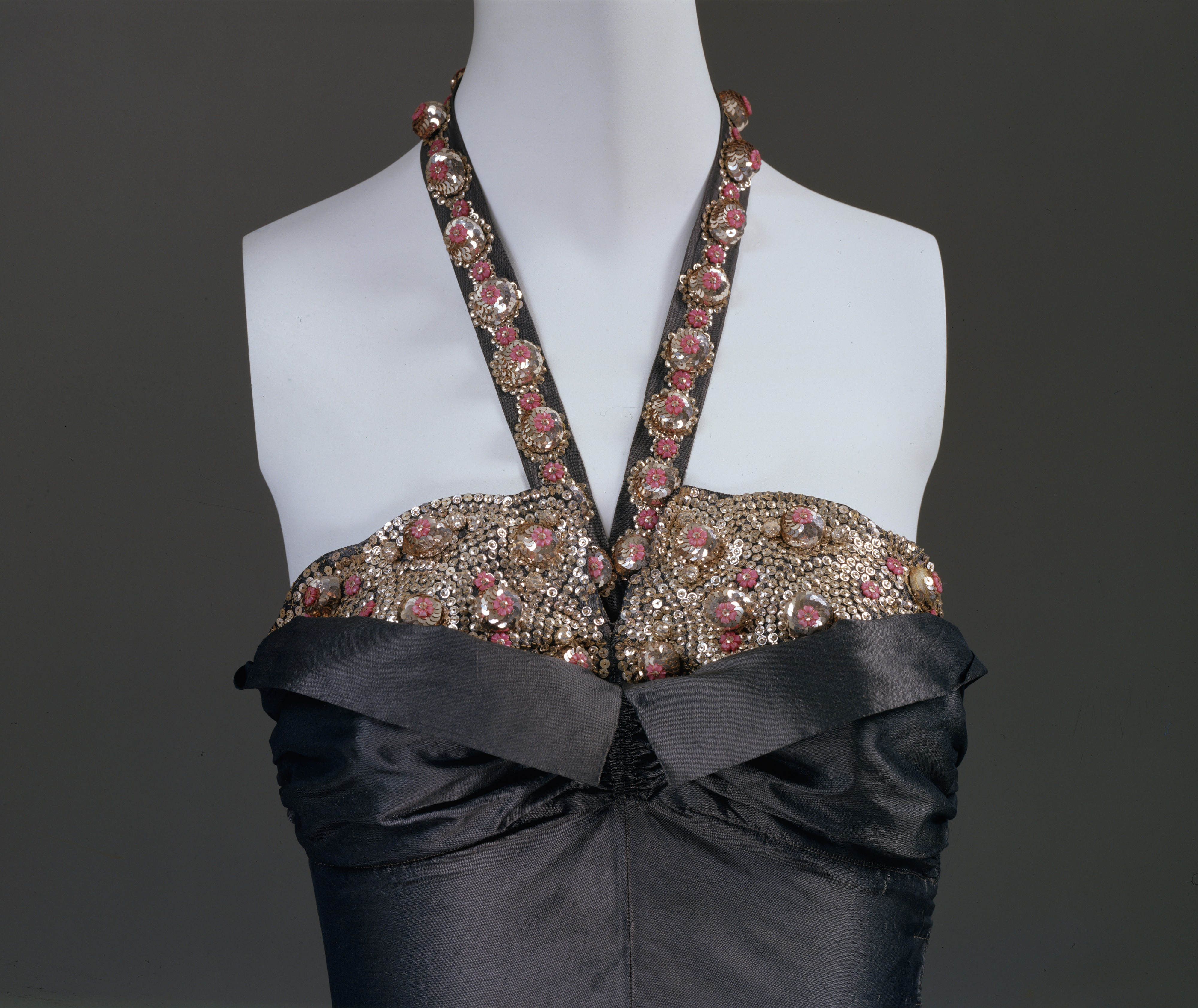 French; Evening dress